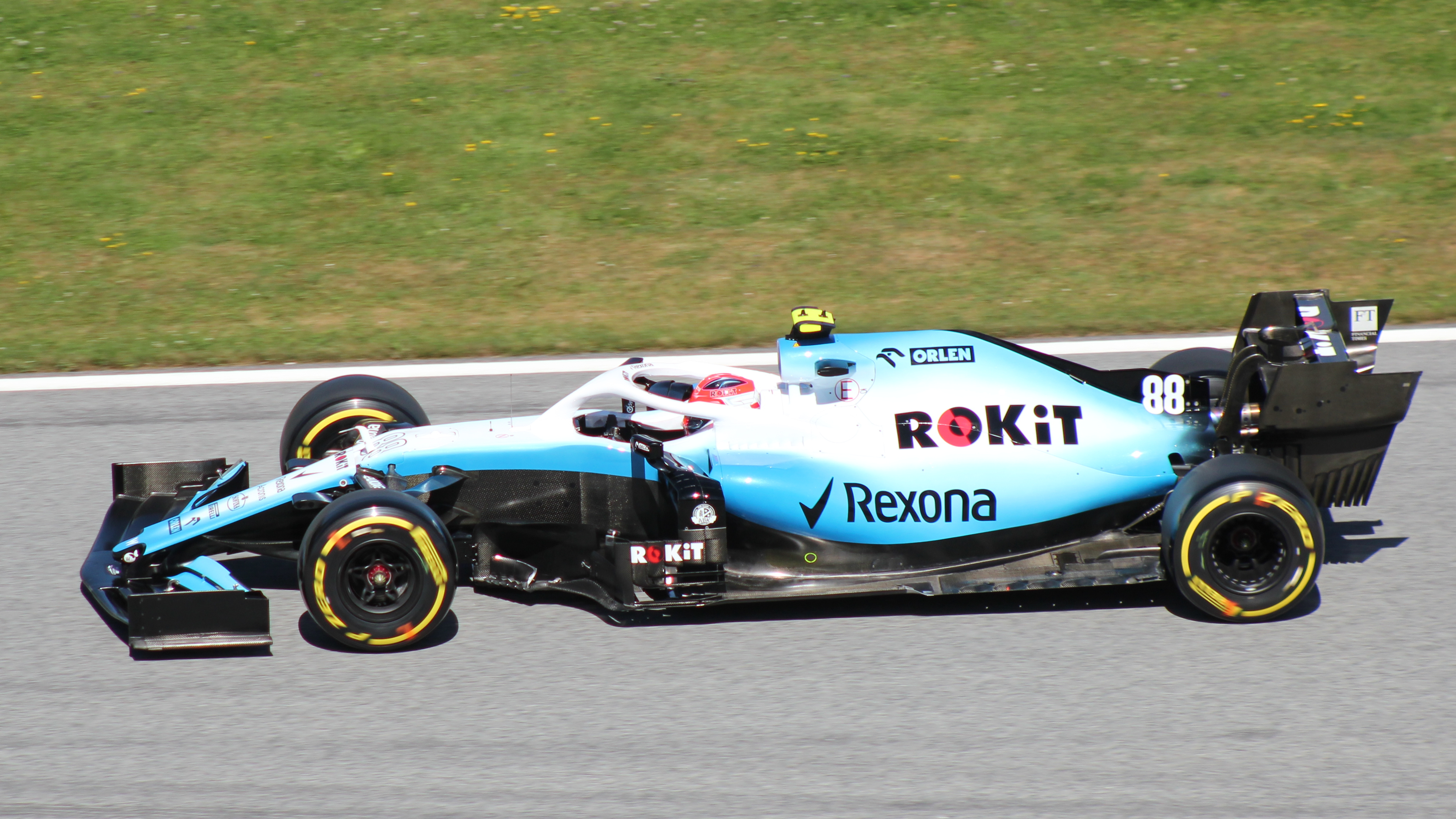 Kubica beim Rennwochenende in Österreich 2019